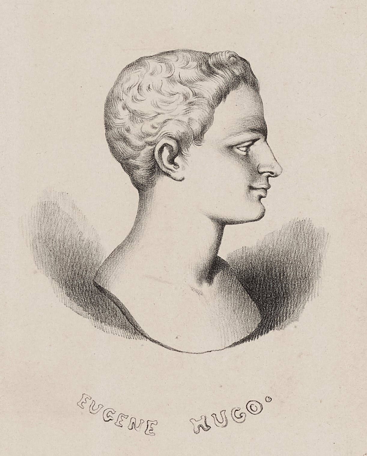 Portrait posthume d'Eugène Hugo, frère de Victor Hugo, représenté de profil en buste sculpté. Lithographie imprimée chez Lemercier, Bénard et Cie, imprimeur-lithographe, 1839.